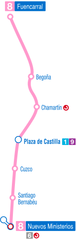 Antigua línea 8 del Metro de Madrid